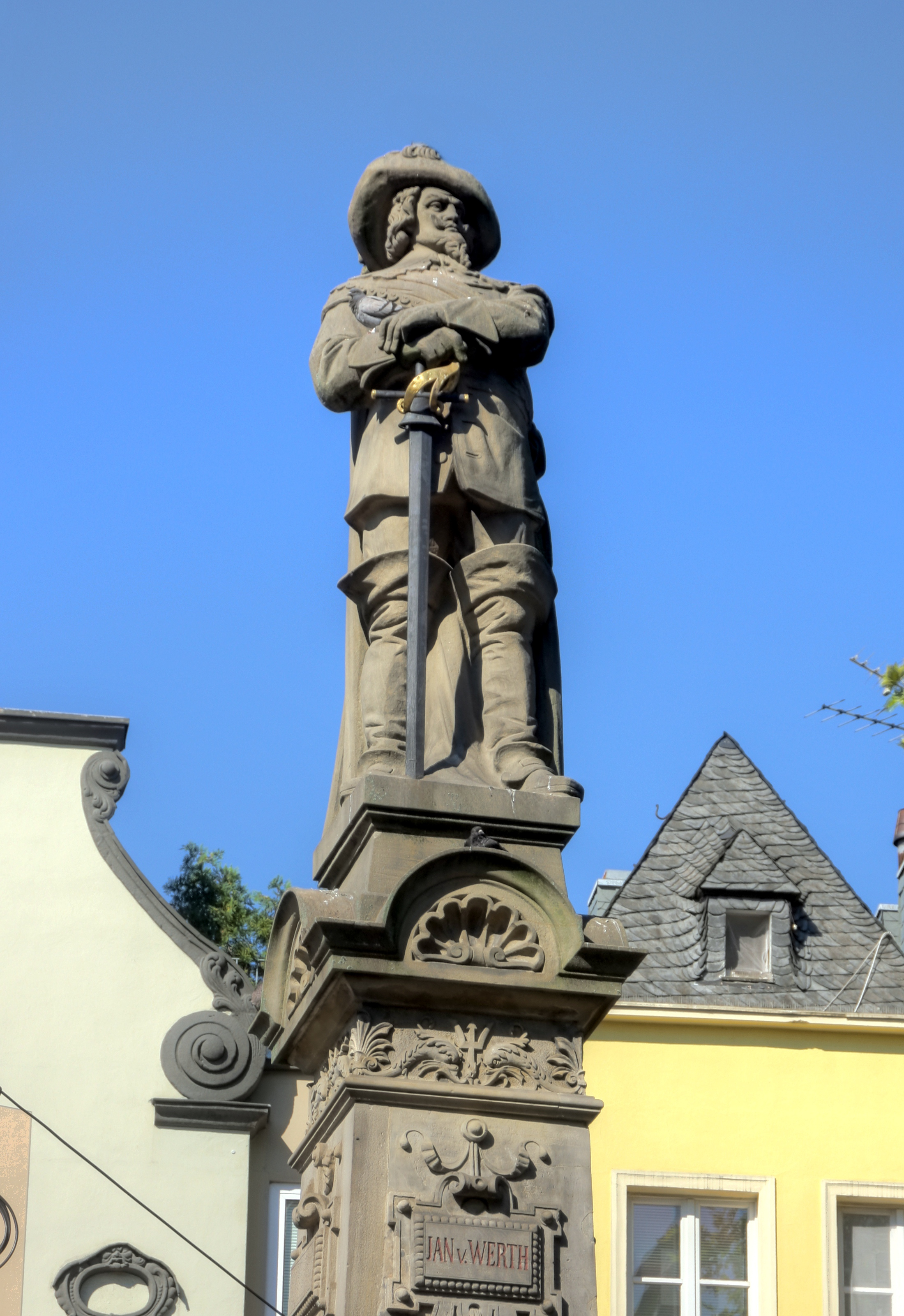 Jan-von-Werth-Brunnen, Alter Markt, Köln. Der 1884 erbaute Brunnen mit dem Denkmal für Jan von Werth wurde von Wilhelm Albermann gestaltet. This is a photograph of an architectural monument.